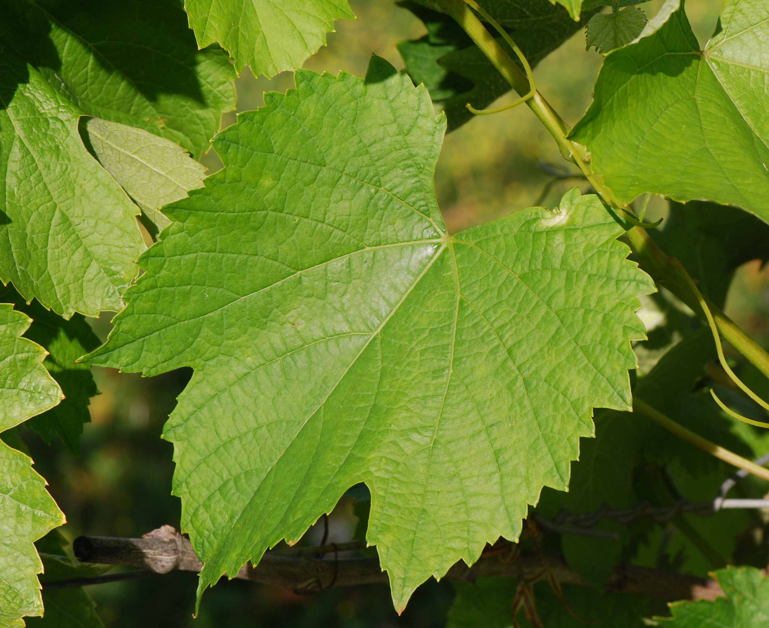 Colombard, feuille, conservatoire du vignoble charentais